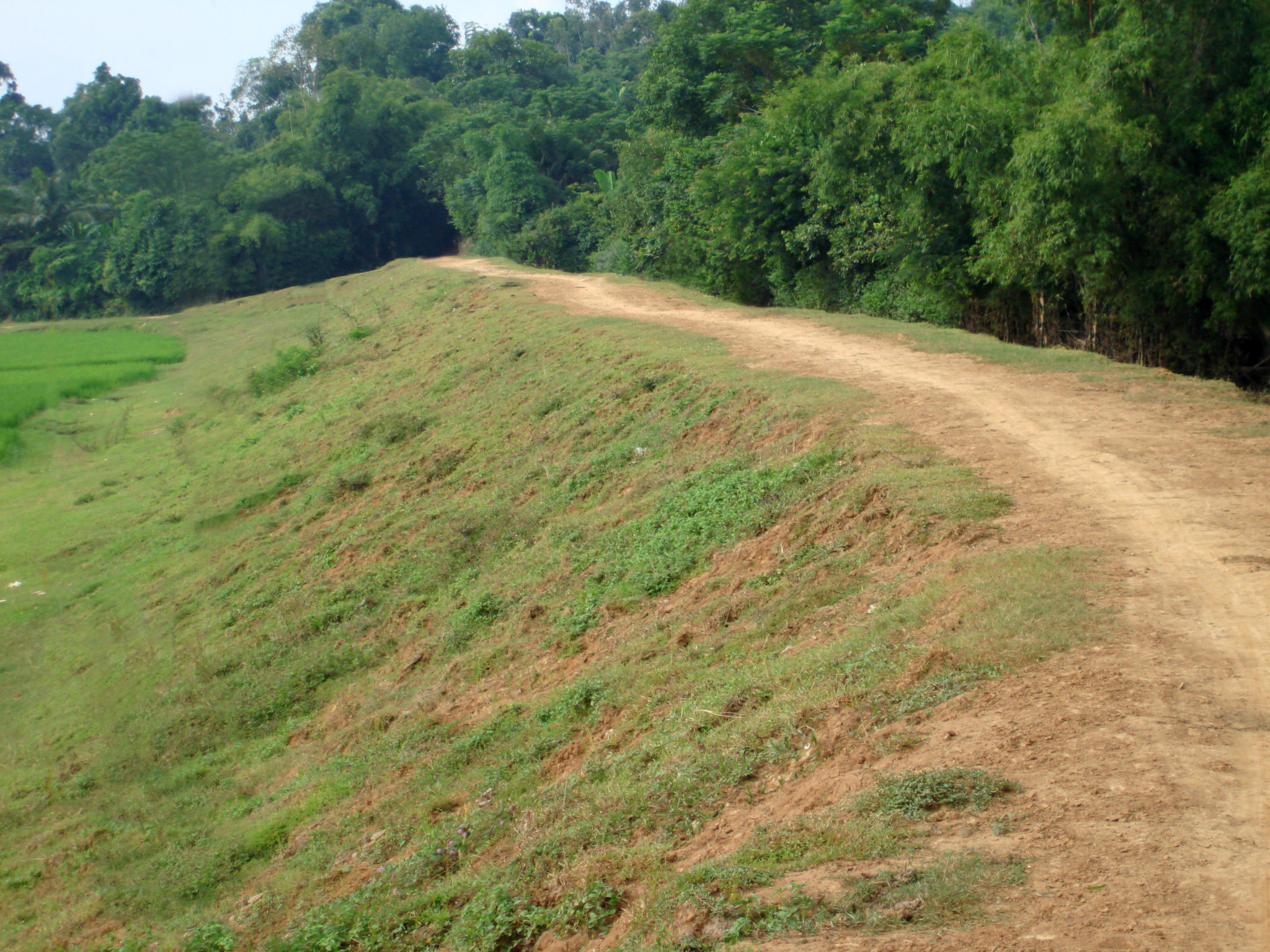 La _thành